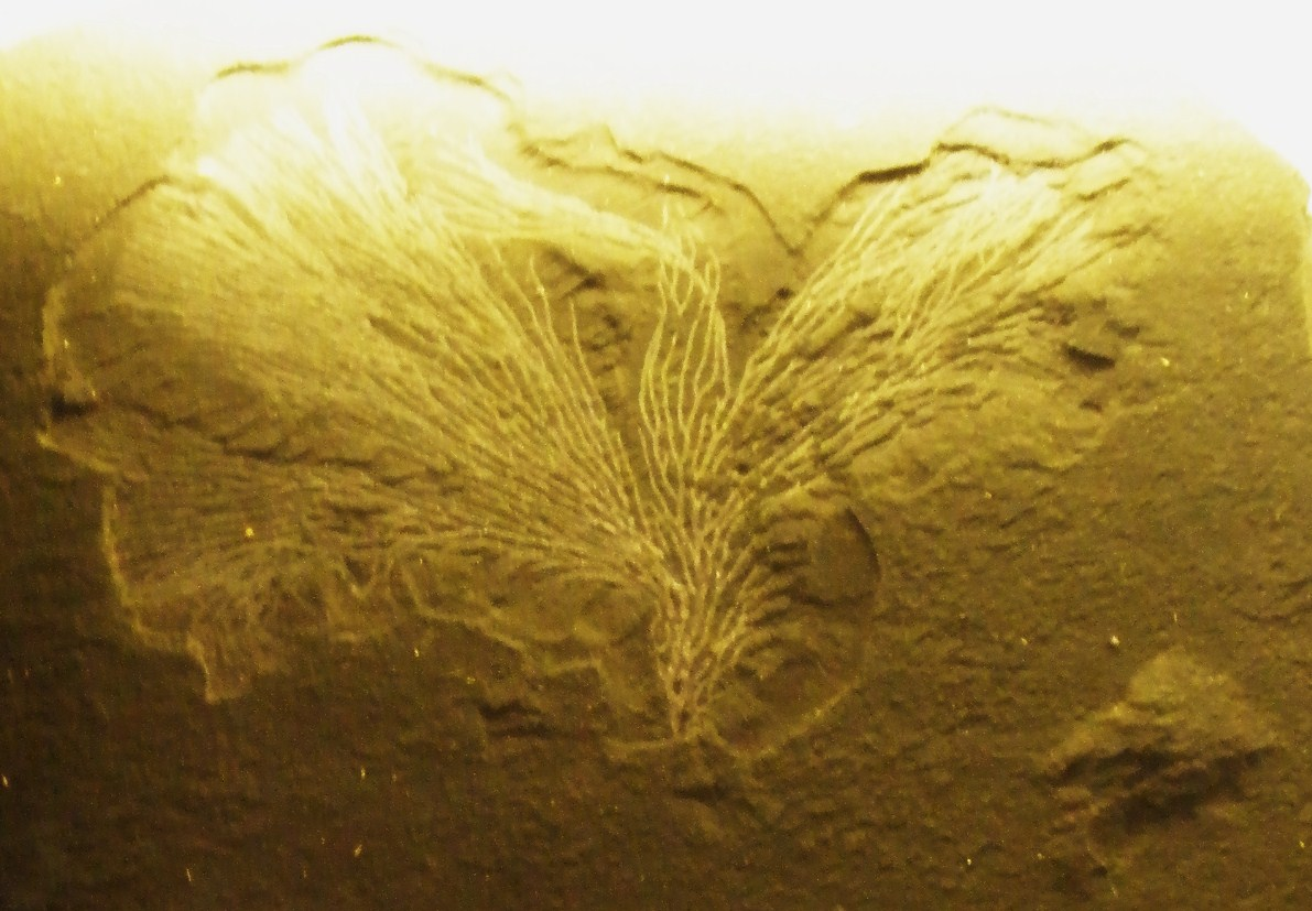 Fossil of Dictyonema, an extinct graptolite - Took the photo at Naturalis museum, Leiden